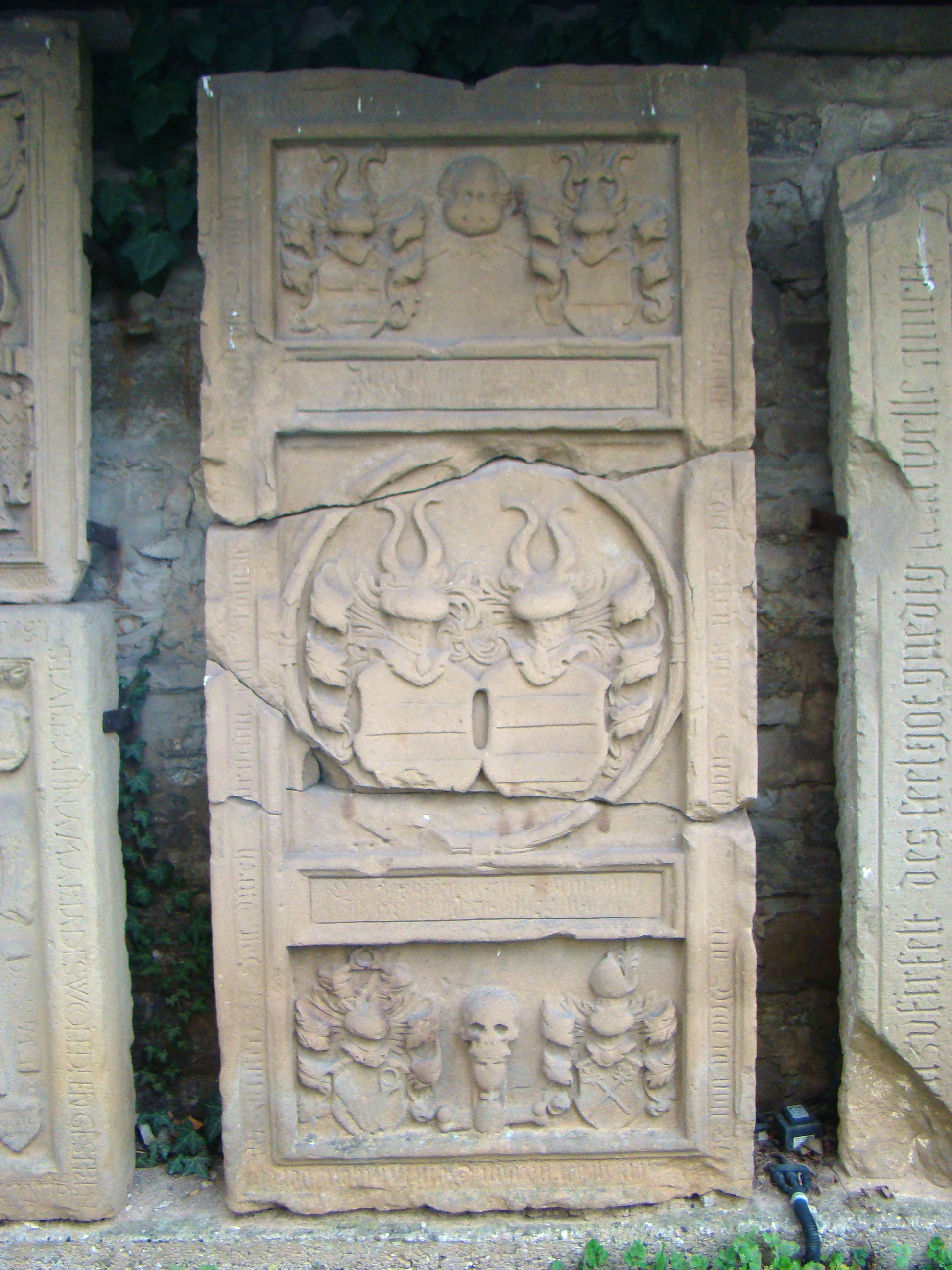 Historische Grabmale beim Unterschloss Gemmingen: Maria von Gemmingen-Bürg († 1609), Frau von Wolf Dietrich von Gemmingen-Gemmingen (1550–1595)